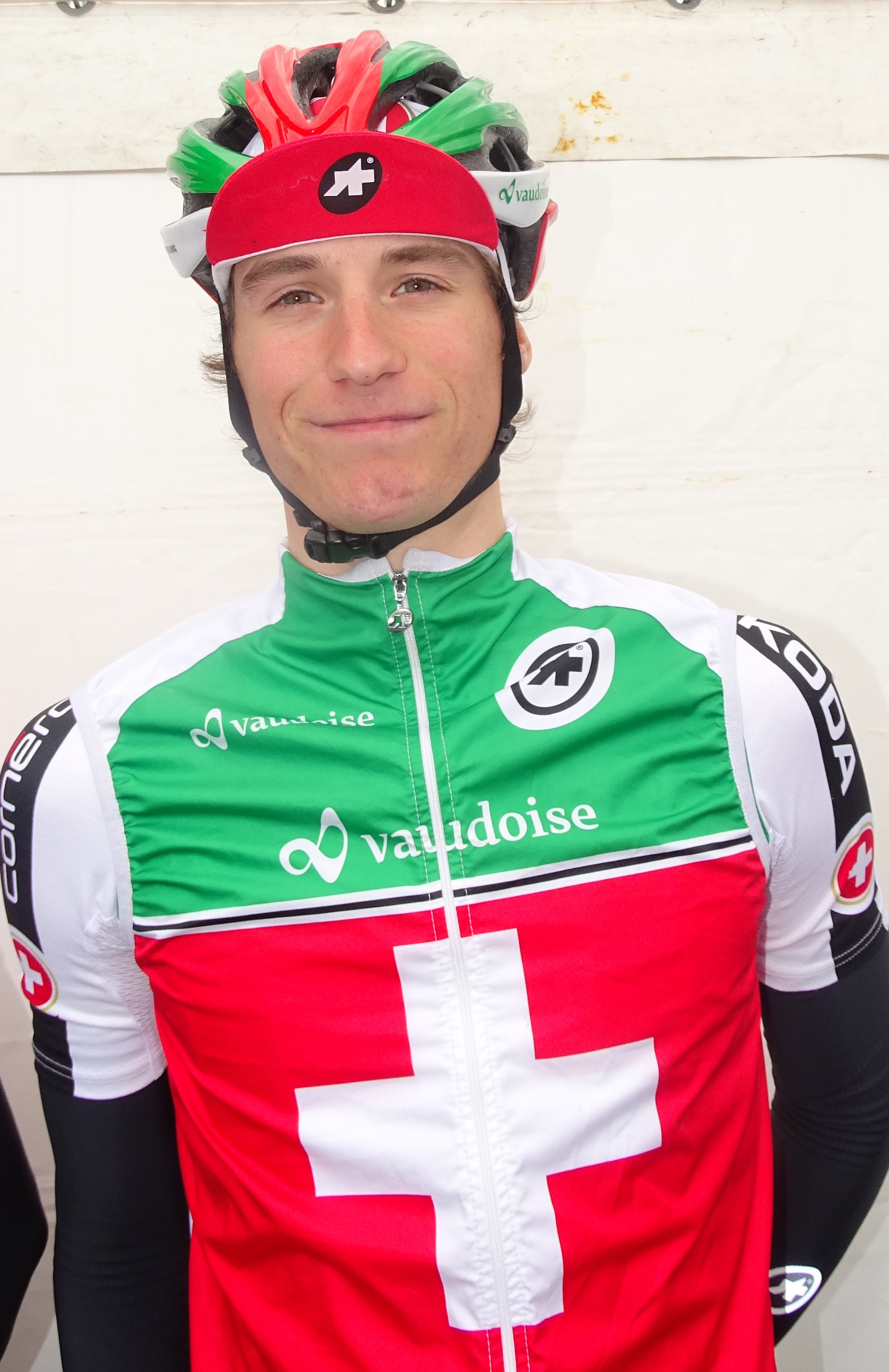 Reportage réalisé le samedi 11 avril à l'occasion du départ et de l'arrivée du Tour des Flandres espoirs 2015 à Audenarde, Belgique.